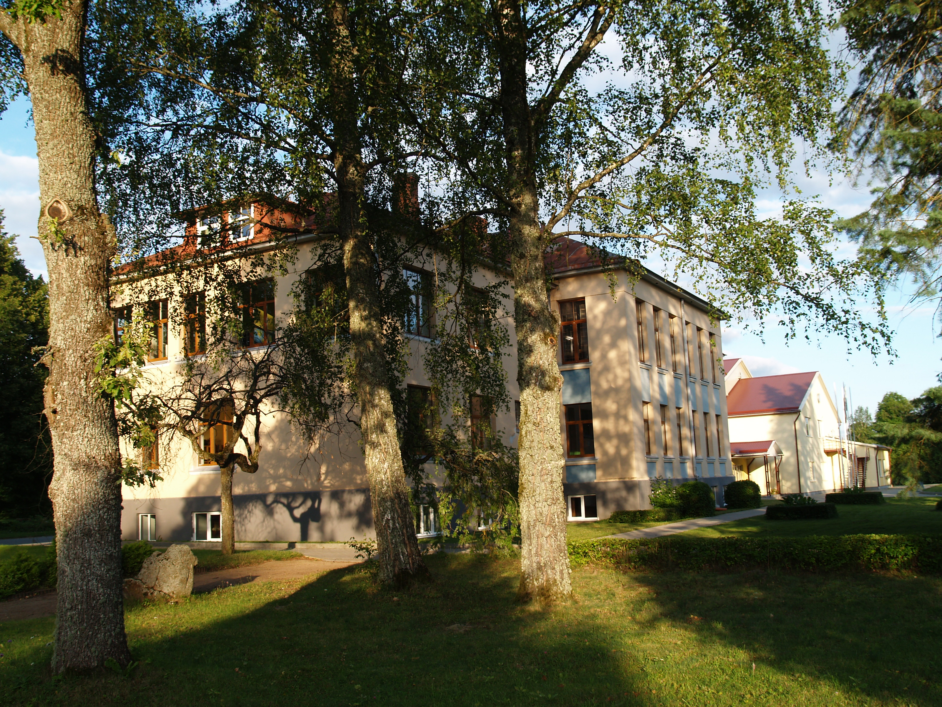 Rencēni kool